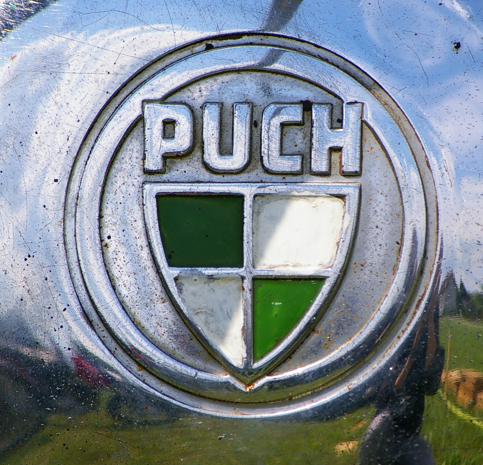 Logo Puch Motorräder